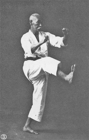 琉球国唐手家・明増盛の「慈恩」(Ming Zengsheng, 1869 - 1945)